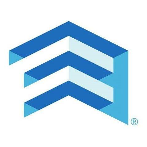 Kompani,Ndërmarrje